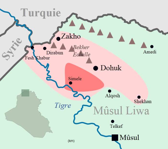 Mouvements pendant le Génocide de Simele. Zone où les villages ont été pillés. Villages assyriens lourdement attaqués.